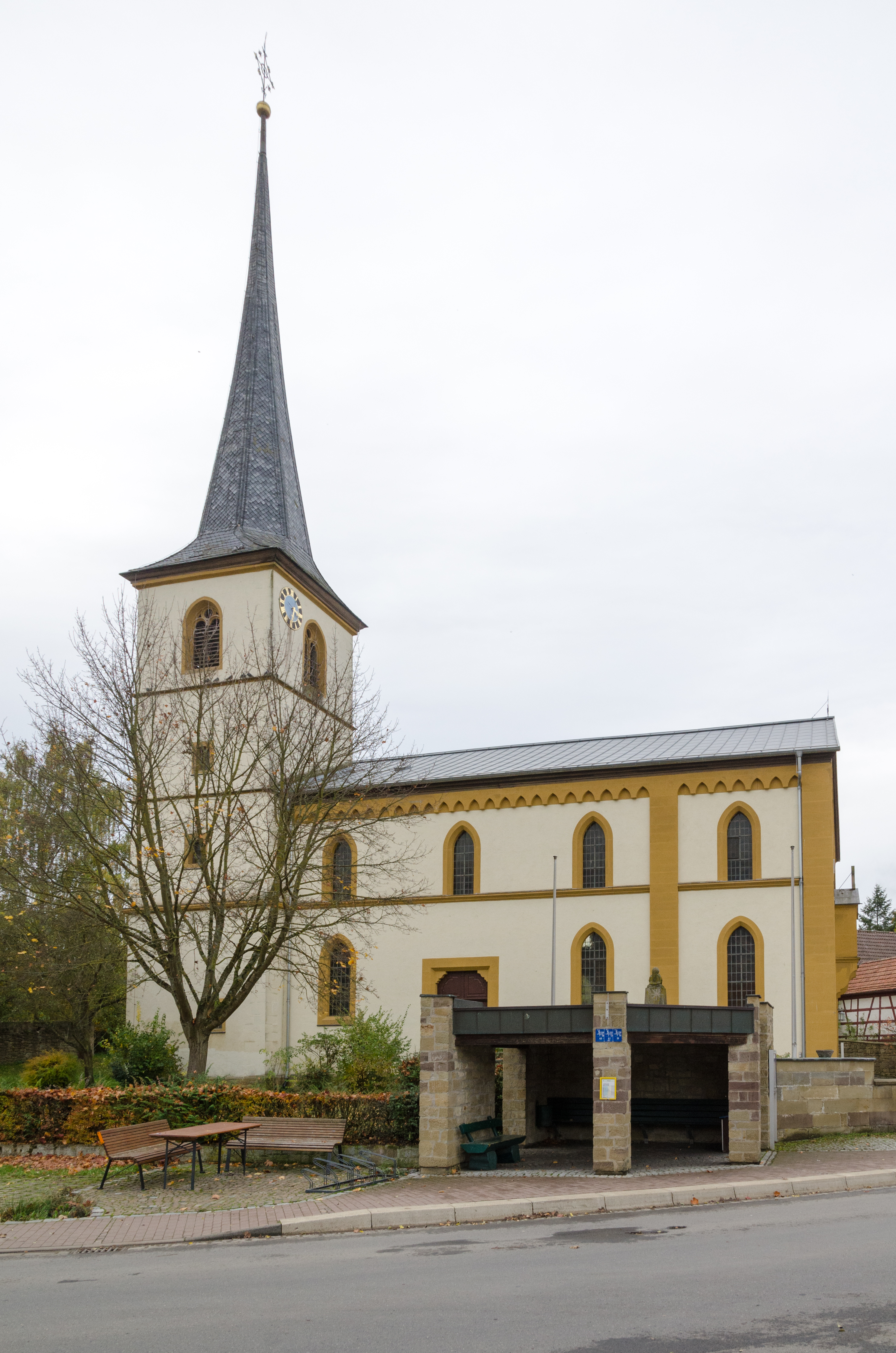 Kützberg, Kath. Pfarrkirche